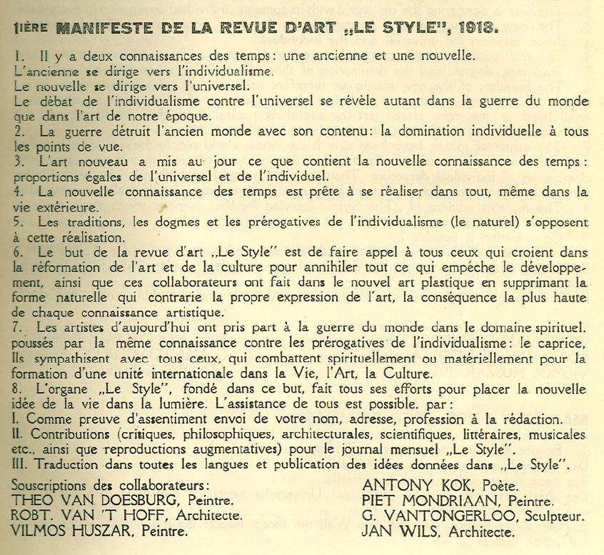 'Première Manifeste de la Revue d'art „Le Style” [sic]', apparu en De Stijl, 2me année, no. 1 (Novembre 1918): p. 3.